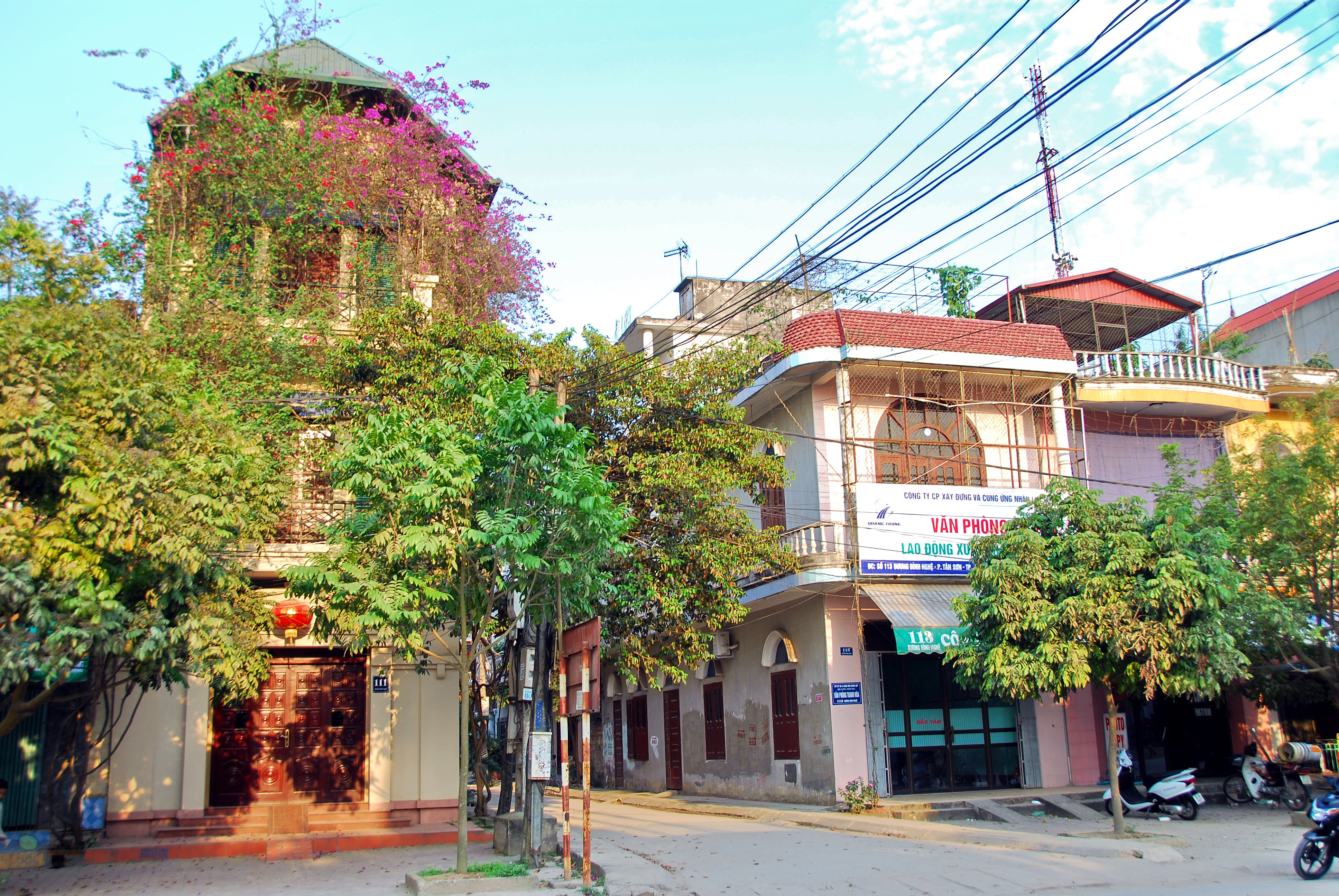 Дома в городе Тханьхоа